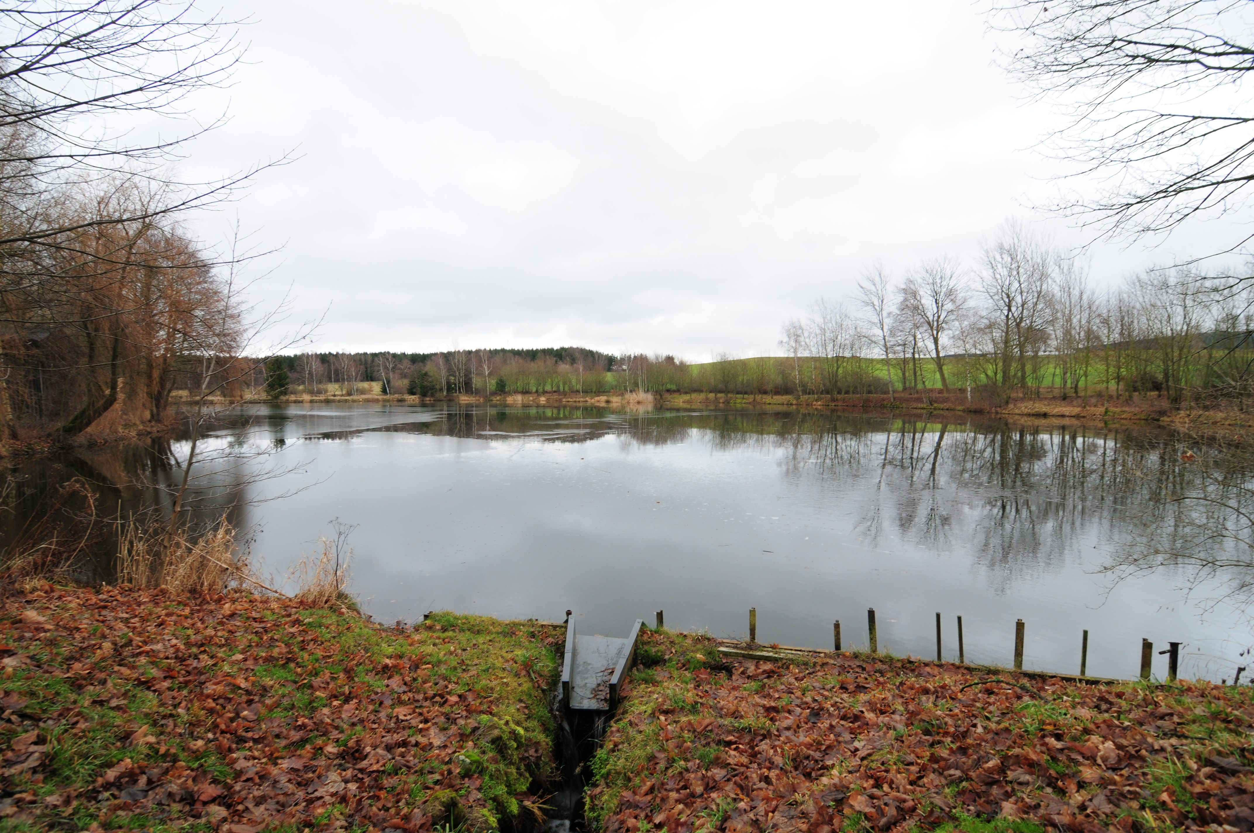 Gemeinde Steinberg, Rödelsteiche bei Wildenau (Vogtlandkreis, Freistaat Sachsen, Deutschland)